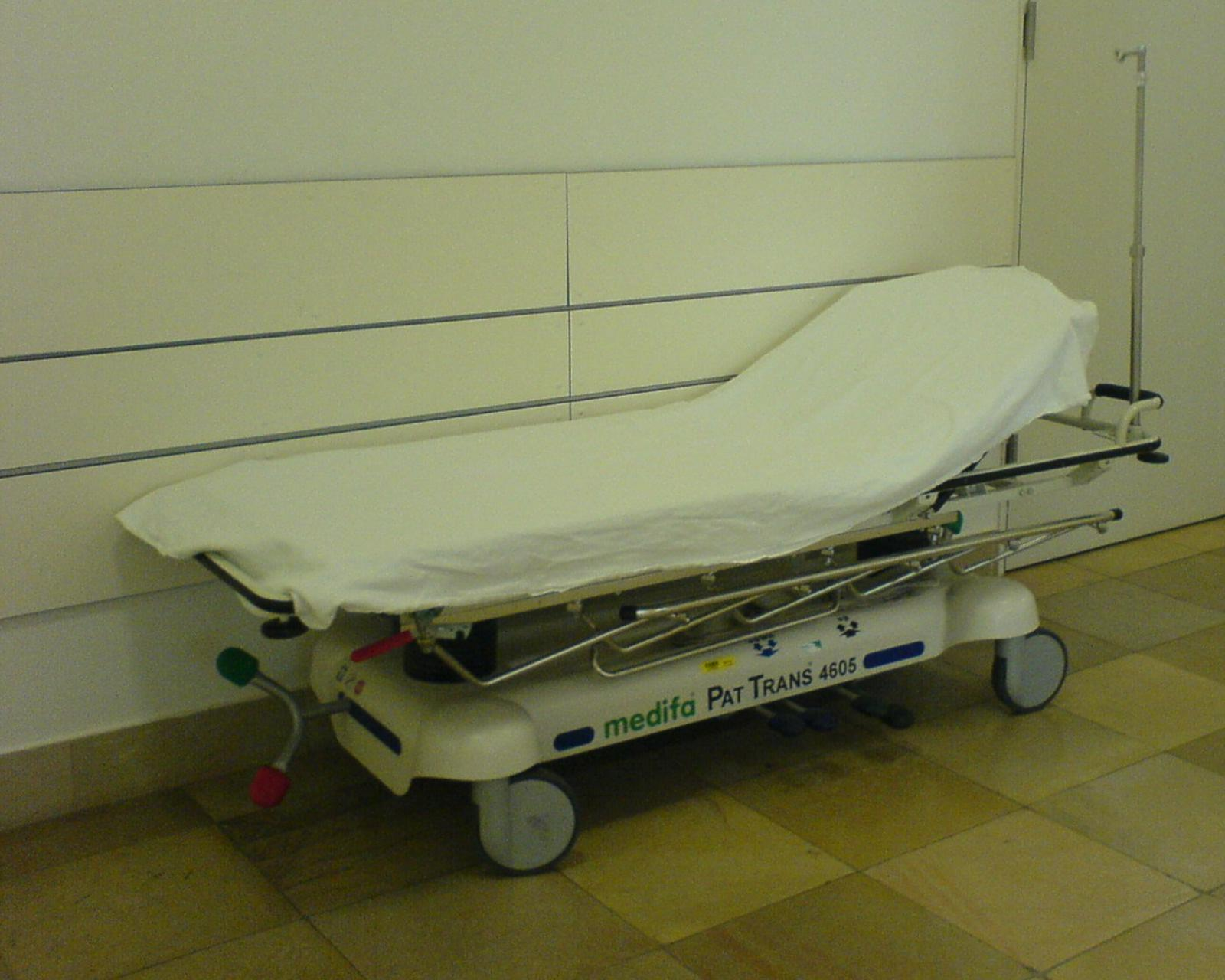 Patiententransporter Pat Trans 4605, produziert durch Medifa ( - PDF) )